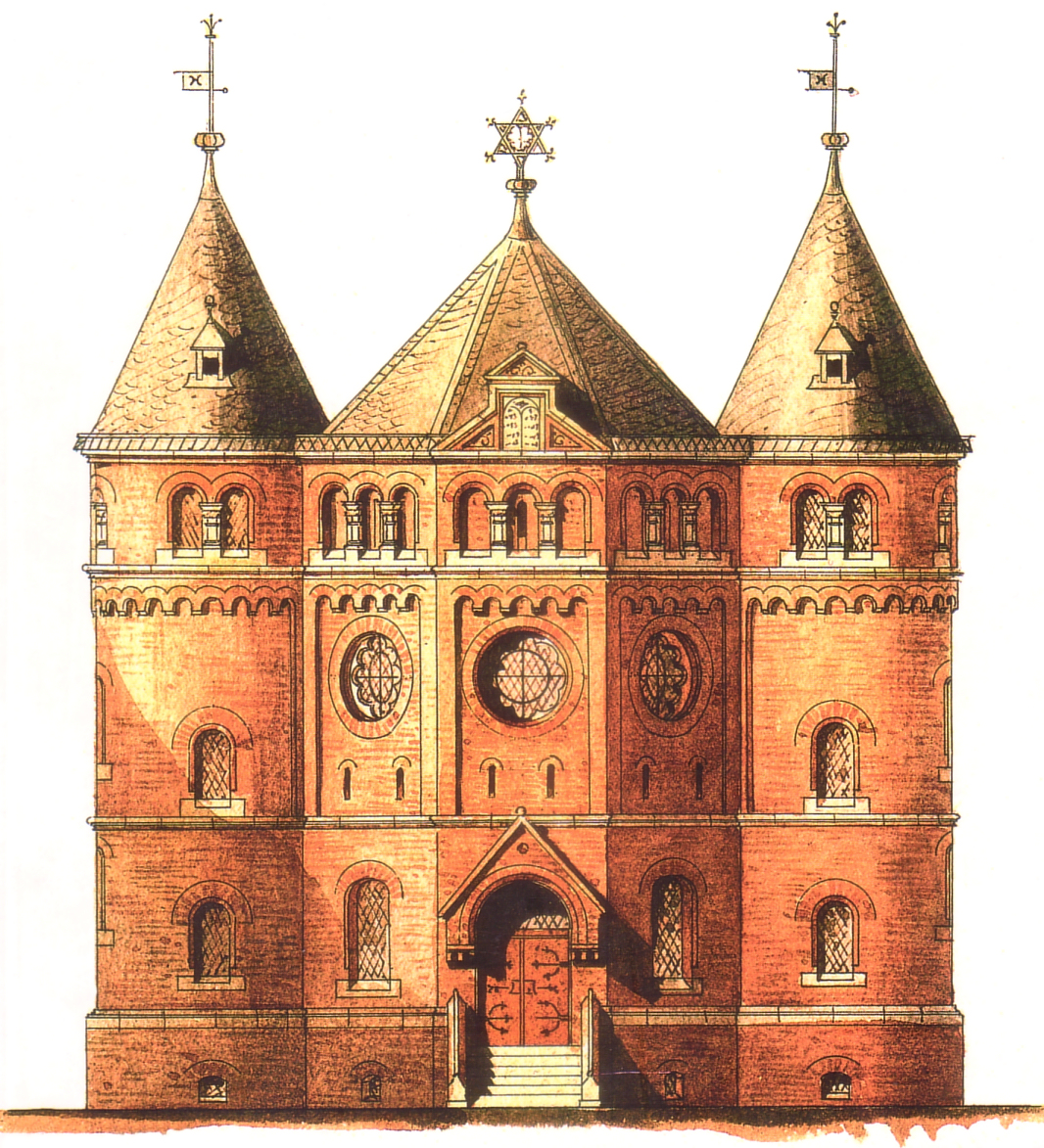 Entwurfszeichnung von Edwin Oppler der Alten Synagoge in Hameln